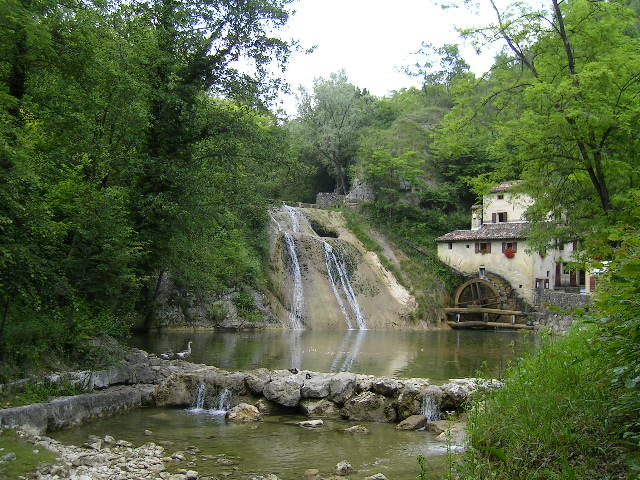 Foto scattata da me medesimo. Ritrae il Molinetto della Croda e il salto d'acqua del torrente Lierza.